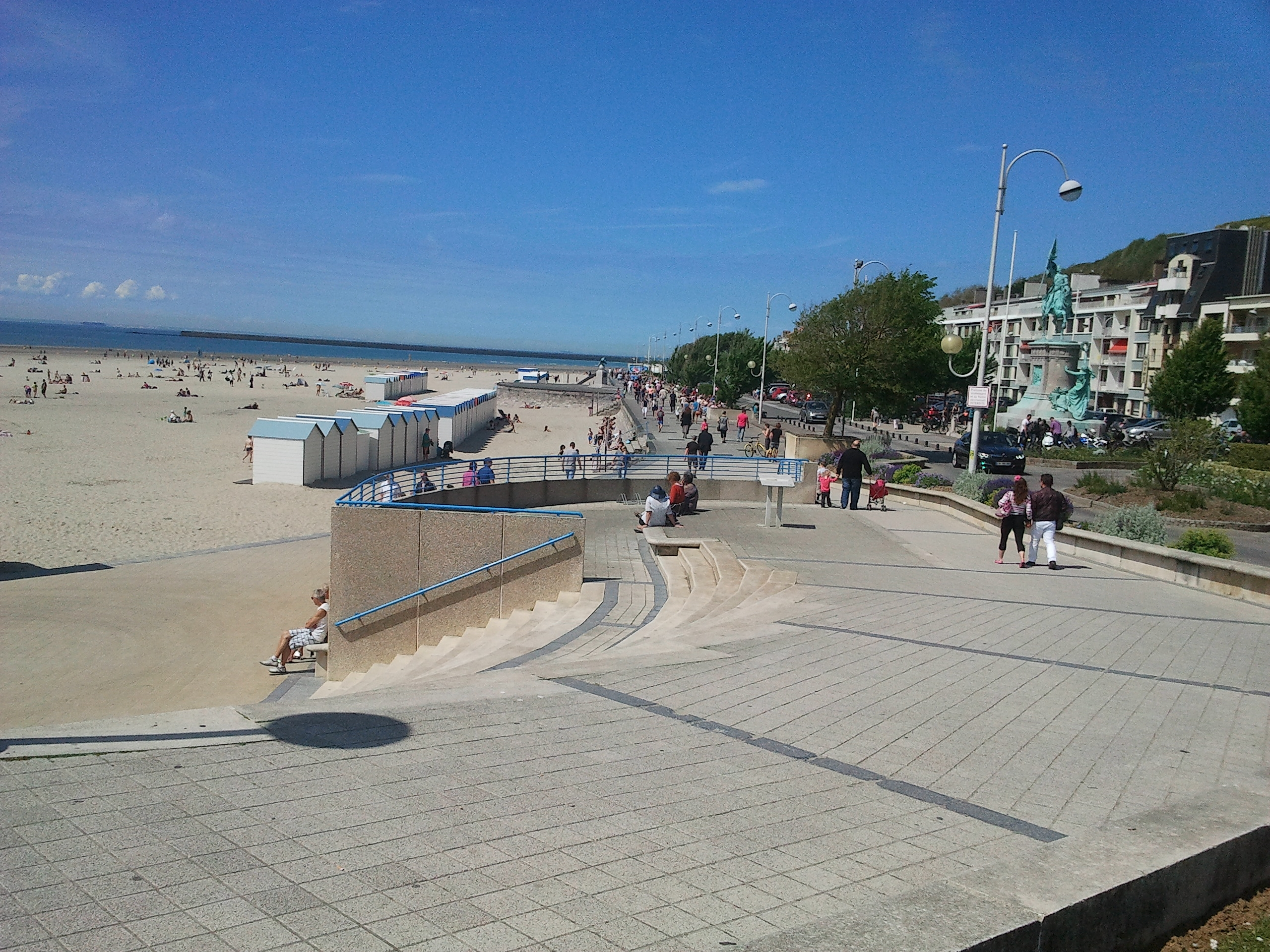 Promenade San Martin, le long de la plage de Boulogne-sur-Mer